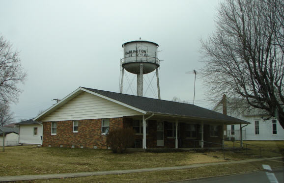 Darlington, Indiana